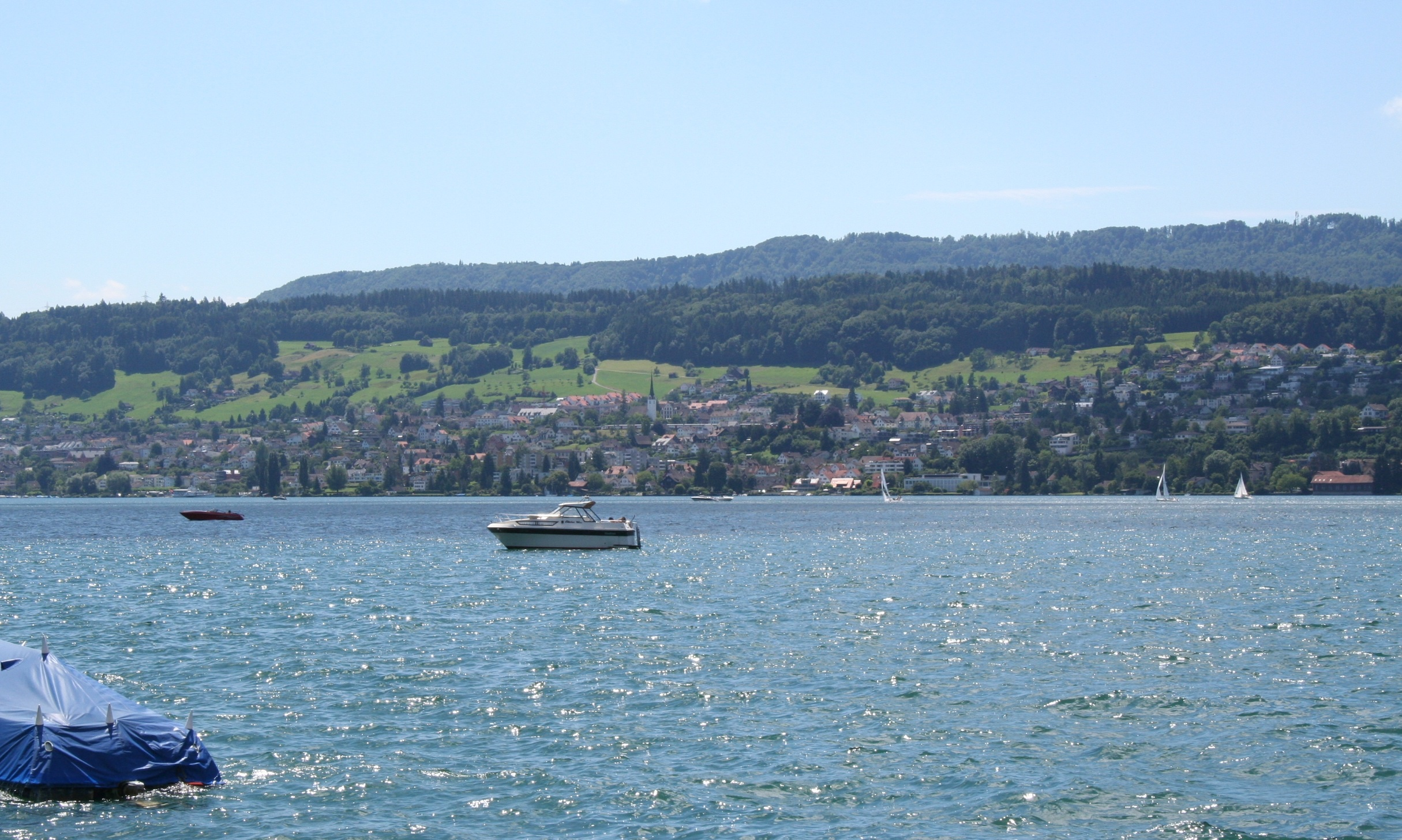 Oberrieden, von Erlenbach aus gesehen